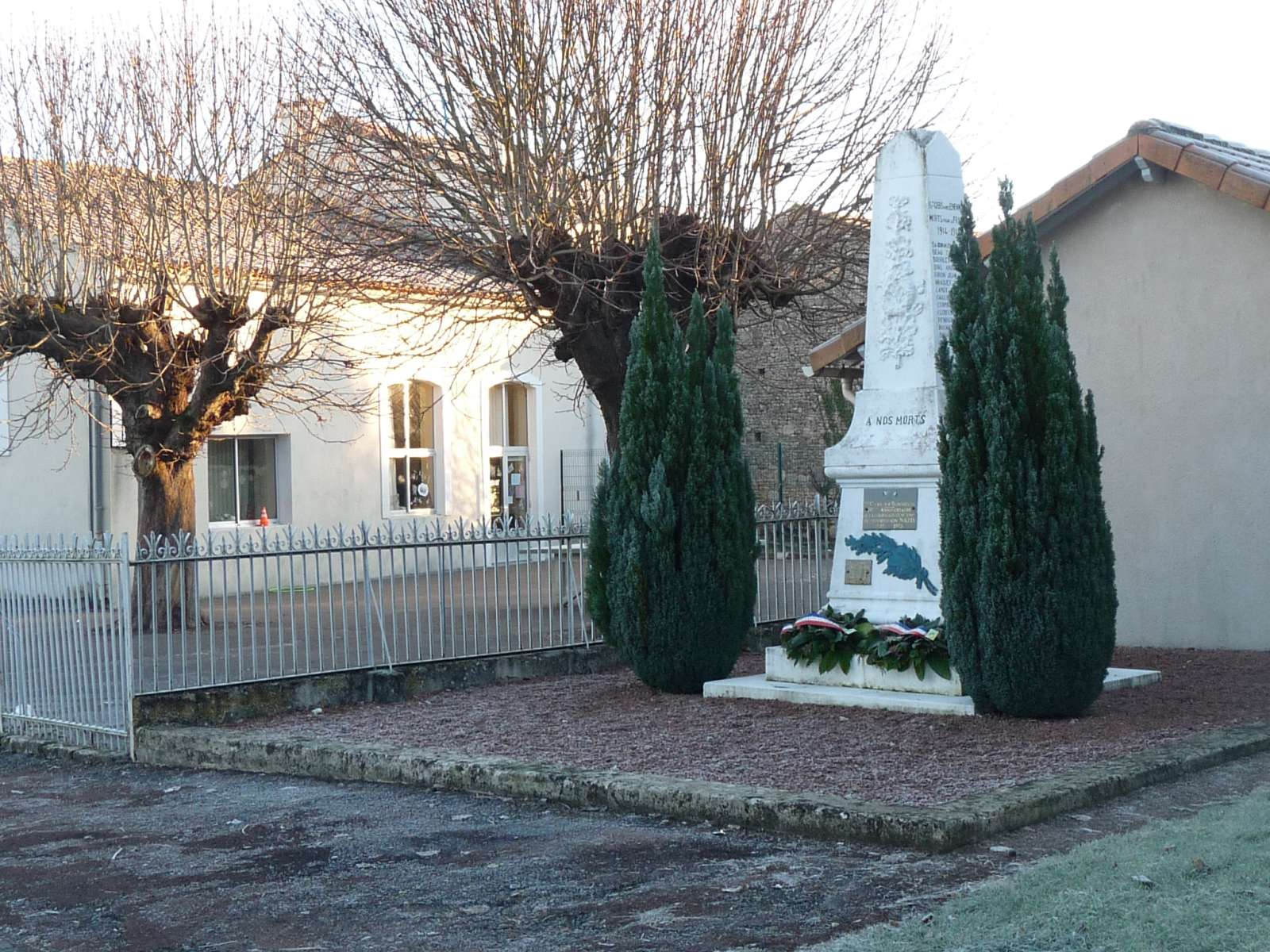 monument aux mort devant l'école de St-Ciers-sur-Bonnieure, Charente, France